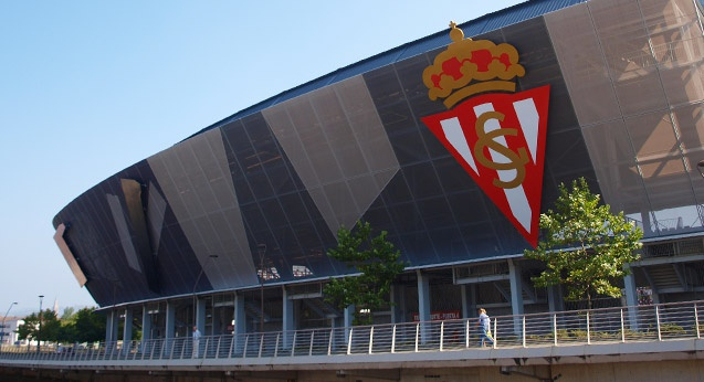 Nuevo aspecto del estadio de fútbol El Molinon.